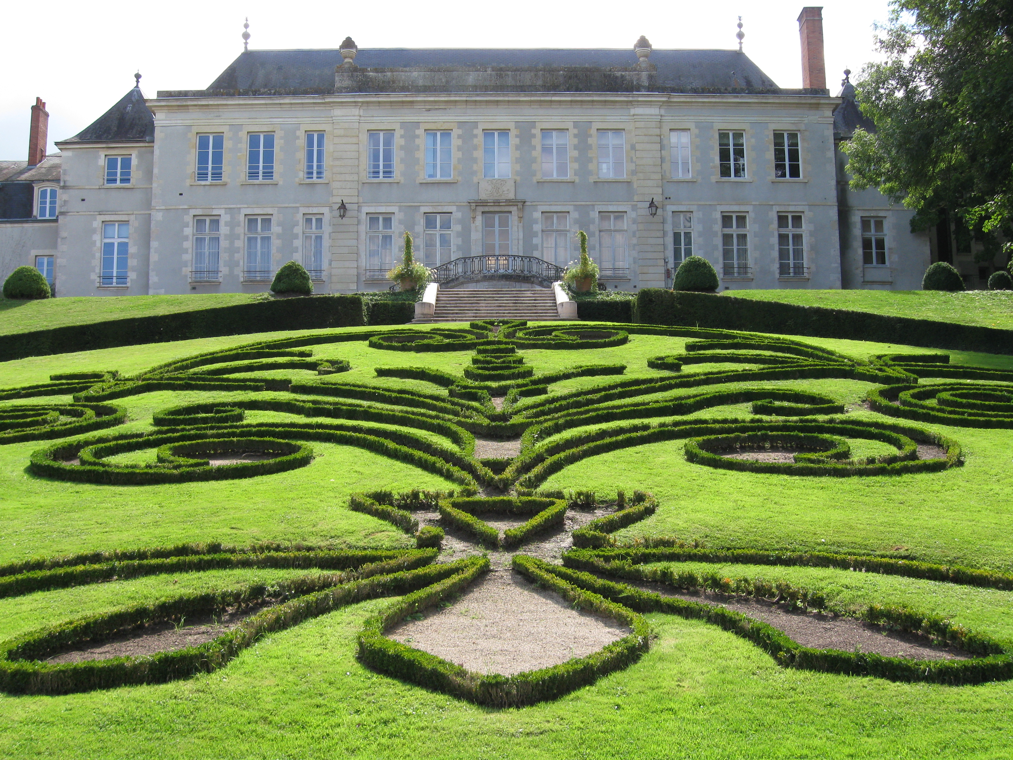 Château de la Source, Orléans, Loiret, France